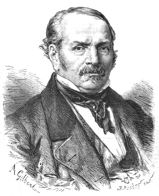 Portrait d'Allan Kardec paru dans le magazine L'Illustration en 1869. Cette article de presse commentait la mort du philosophe spirite.